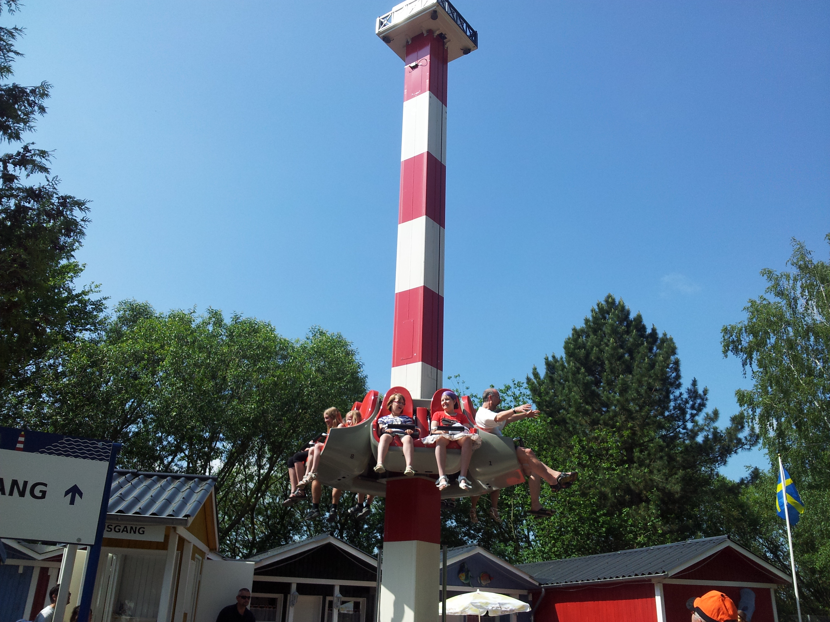 Rastiland Freifalltower